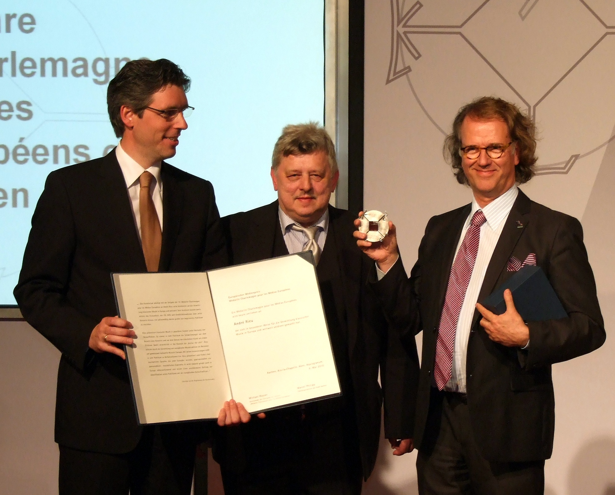 André Rieu bekommt die Karlsmedaille für europäische Medien verliehen. OB Marcel Philipp (links), André Rieu (rechts)